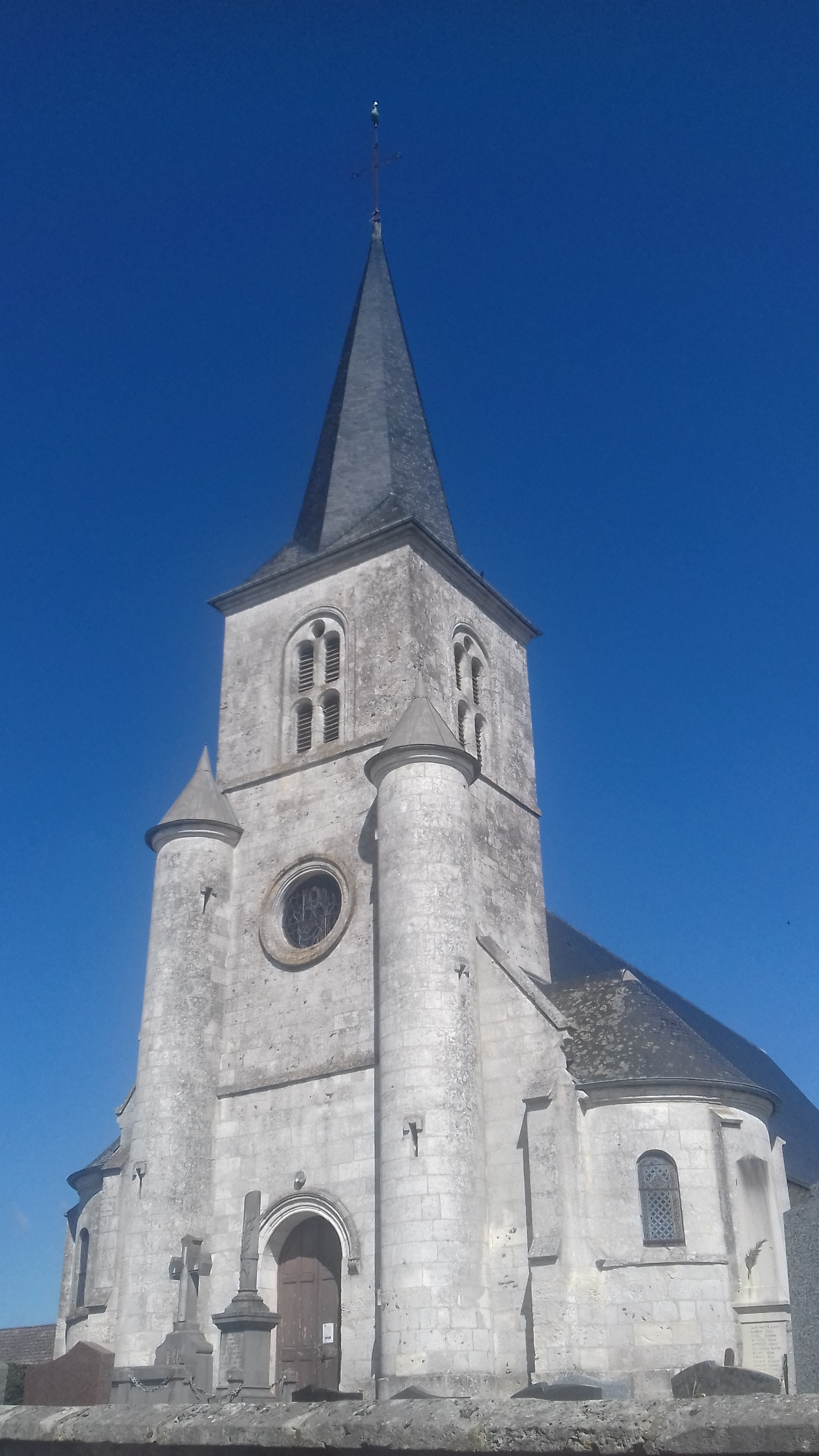 L'Eglise Notre Dame à Louvetot, Seine-Maritime en mai 2019.